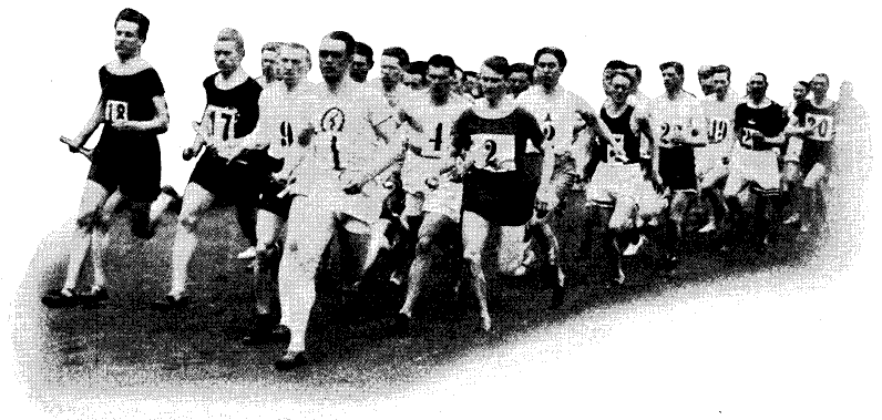 Svenska Dagbladets stafett 27 maj 1923 från en bild i Svenska dagbladets årsbok 1923 tillgänglig via projekt Runeberg. Bildtext: "Stafetthären i Svenska Dagbladets stafettlöpning den 27 maj löper ut ur Stadion."